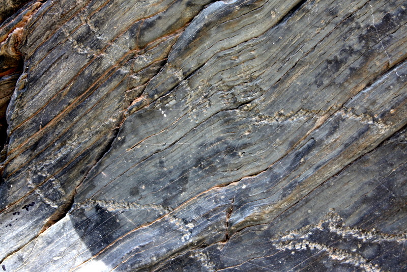 Estación de Arte Rupestre de Siega Verde (Grabados)